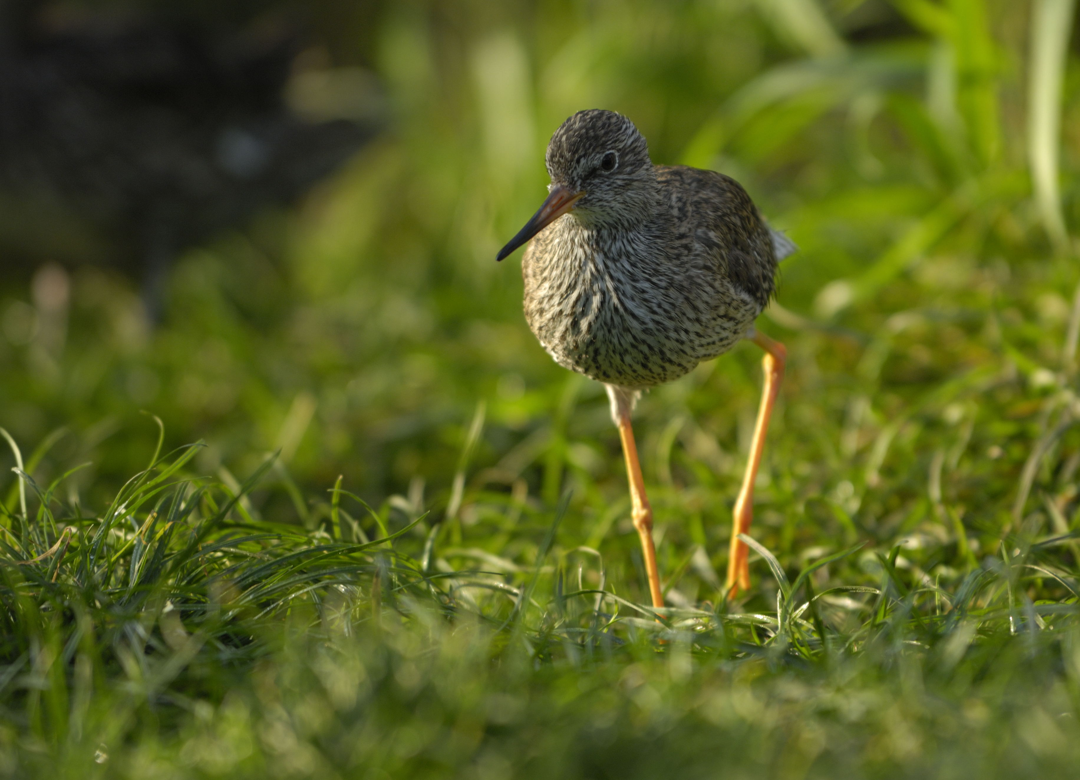 Rotschenkel (Tringa totanus) im Tiergarten Schönbrunn, Wien, Österreich